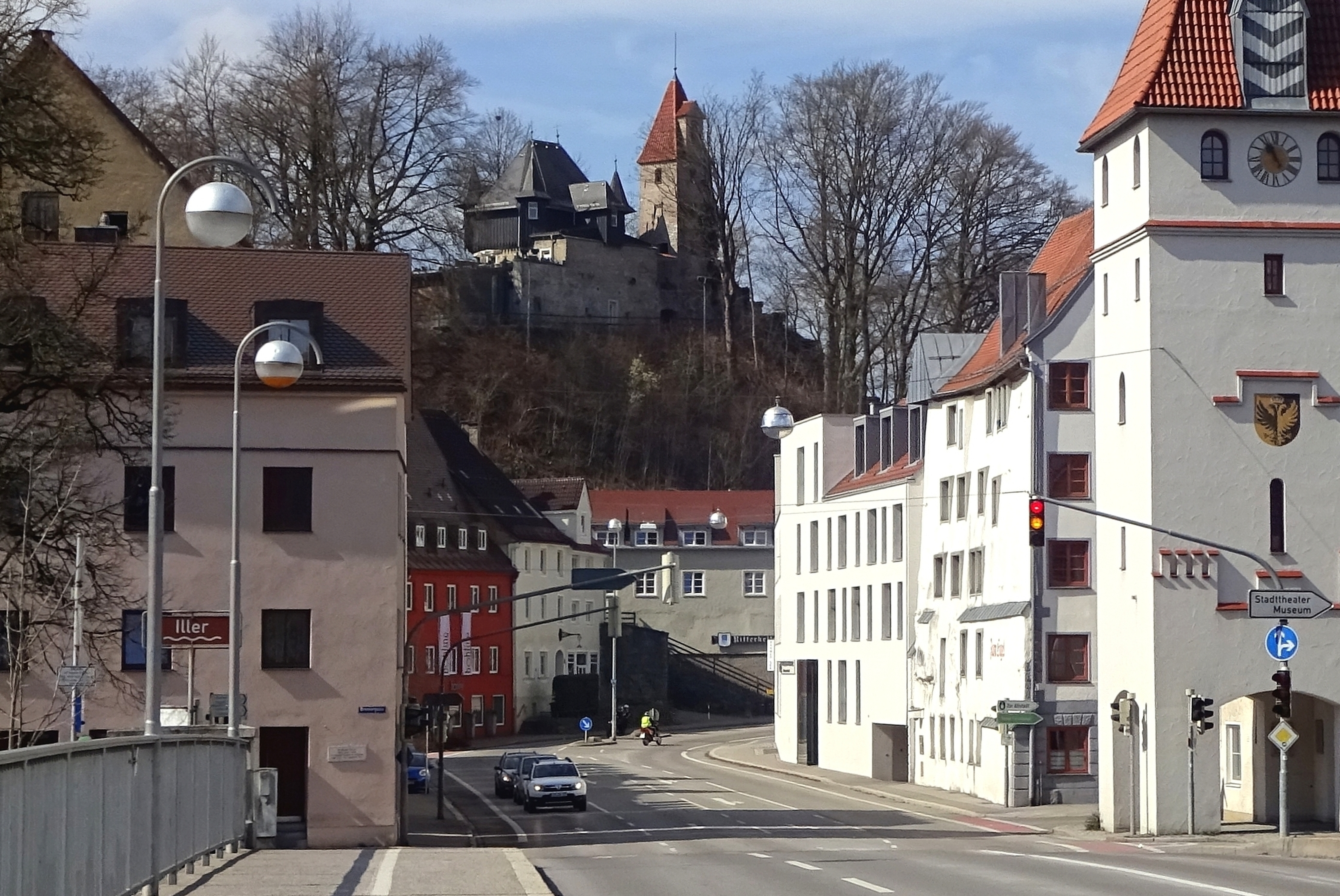 April 2015